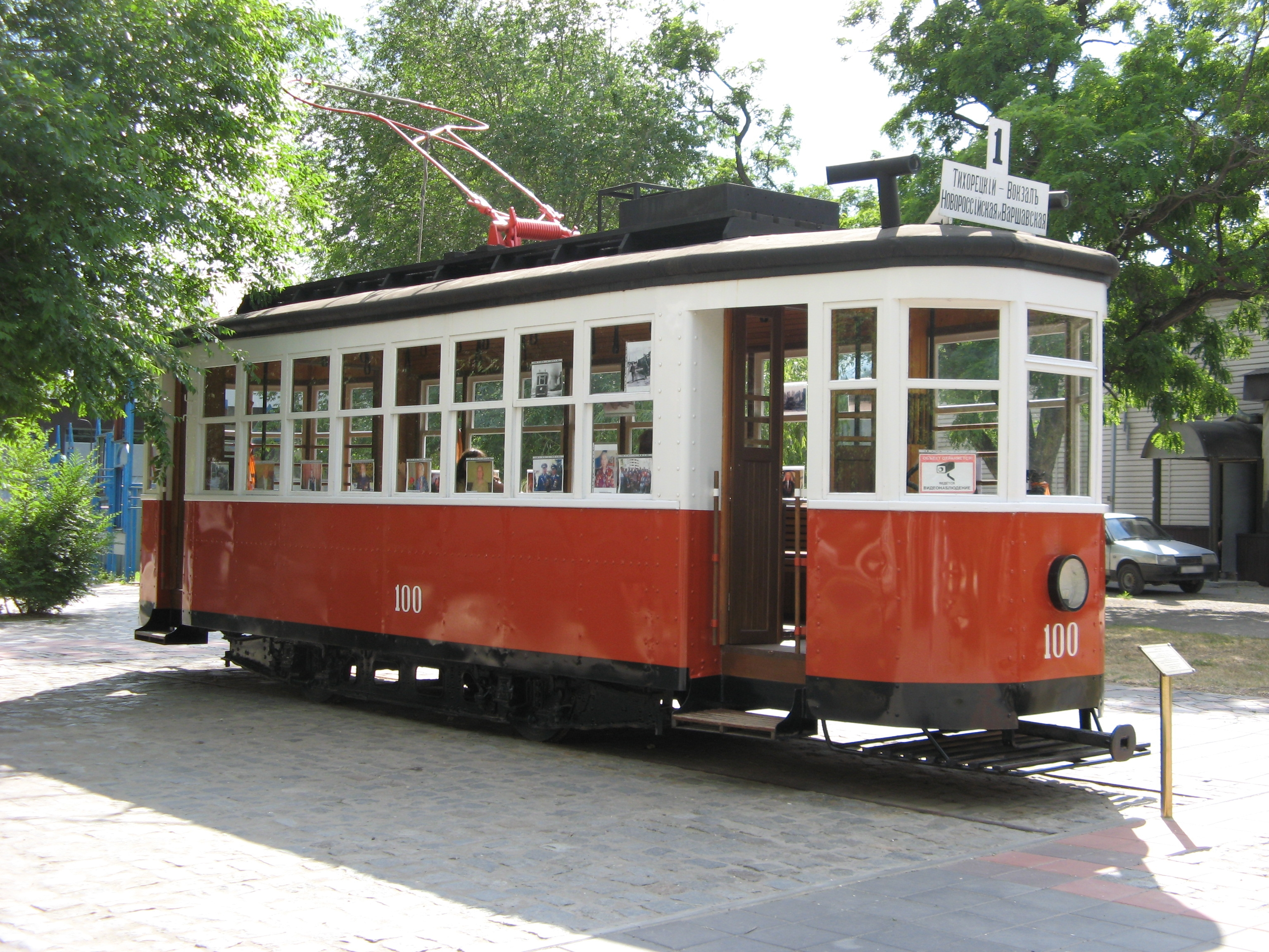 Памятник трамвайному вагону серии Х в городе Волгограде